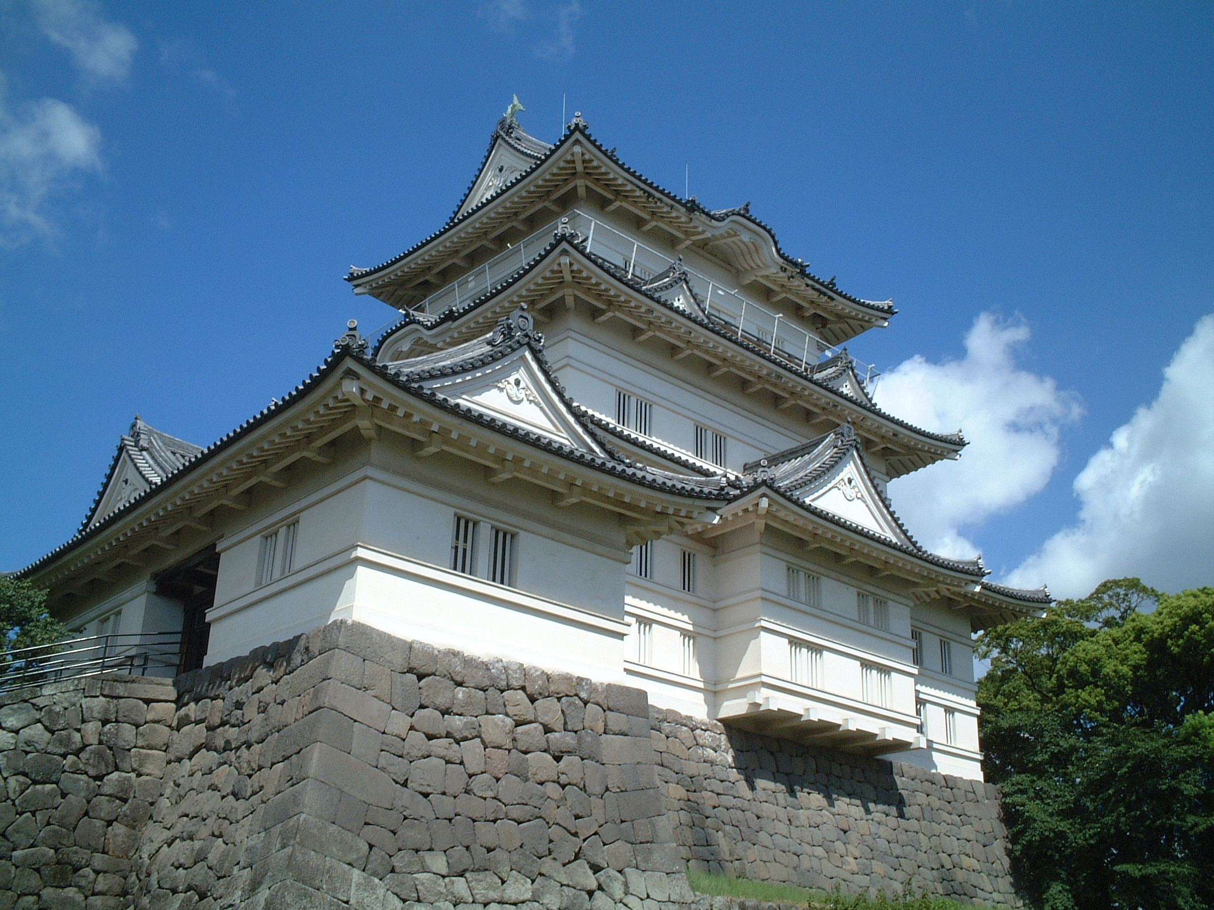 odawara castle